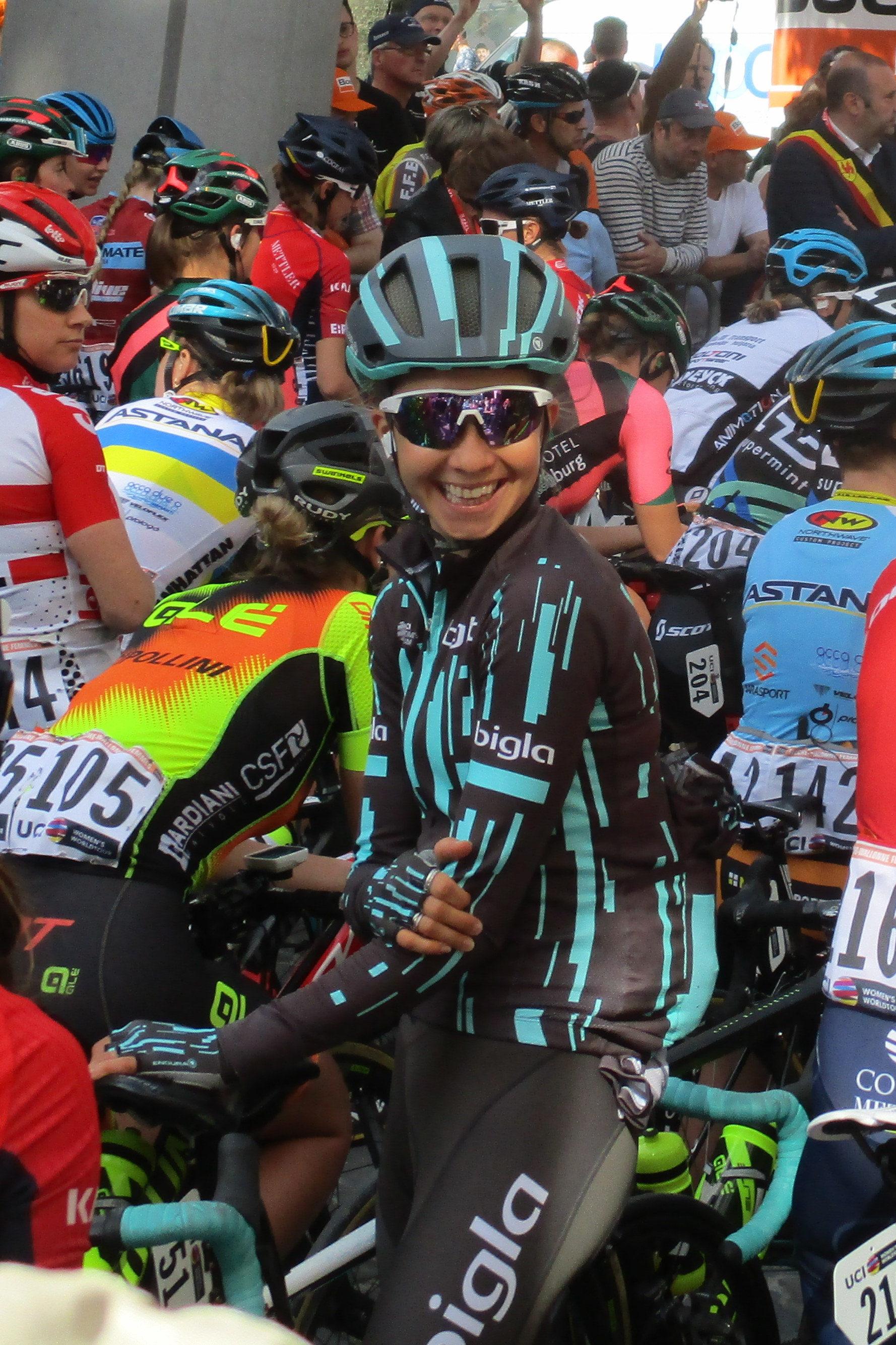 Start van de Waalse Pijl 2019 voor vrouwen in Huy